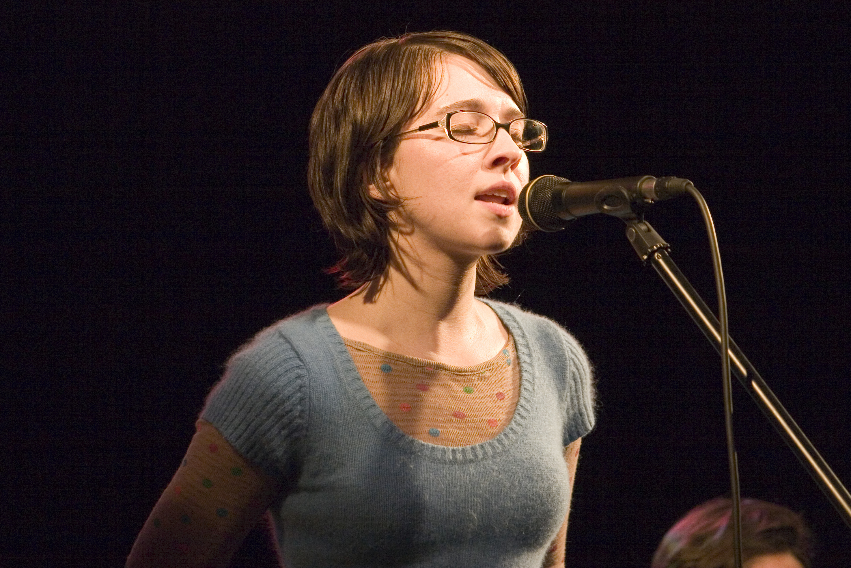 Jen Wood